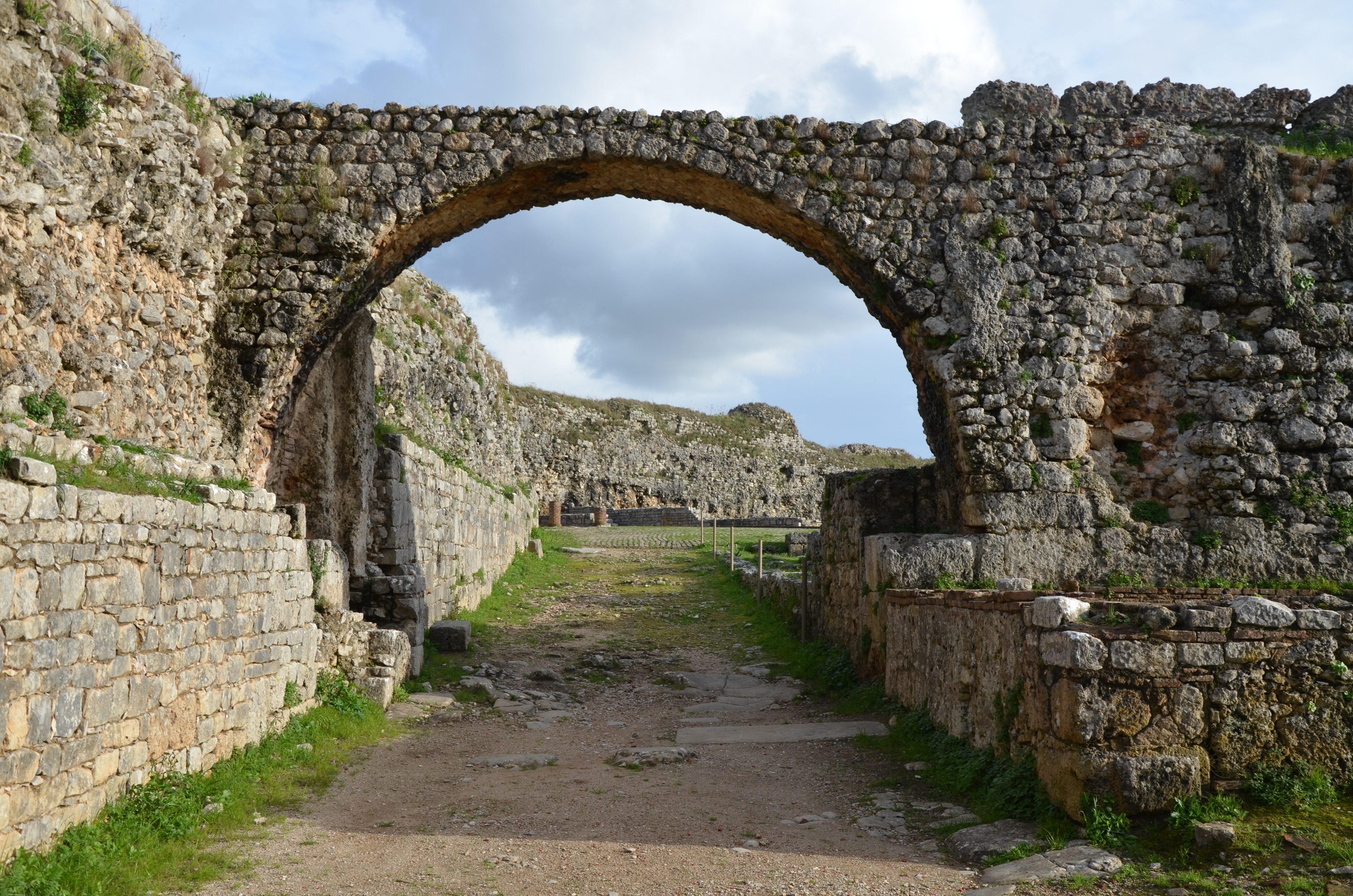 Conimbriga